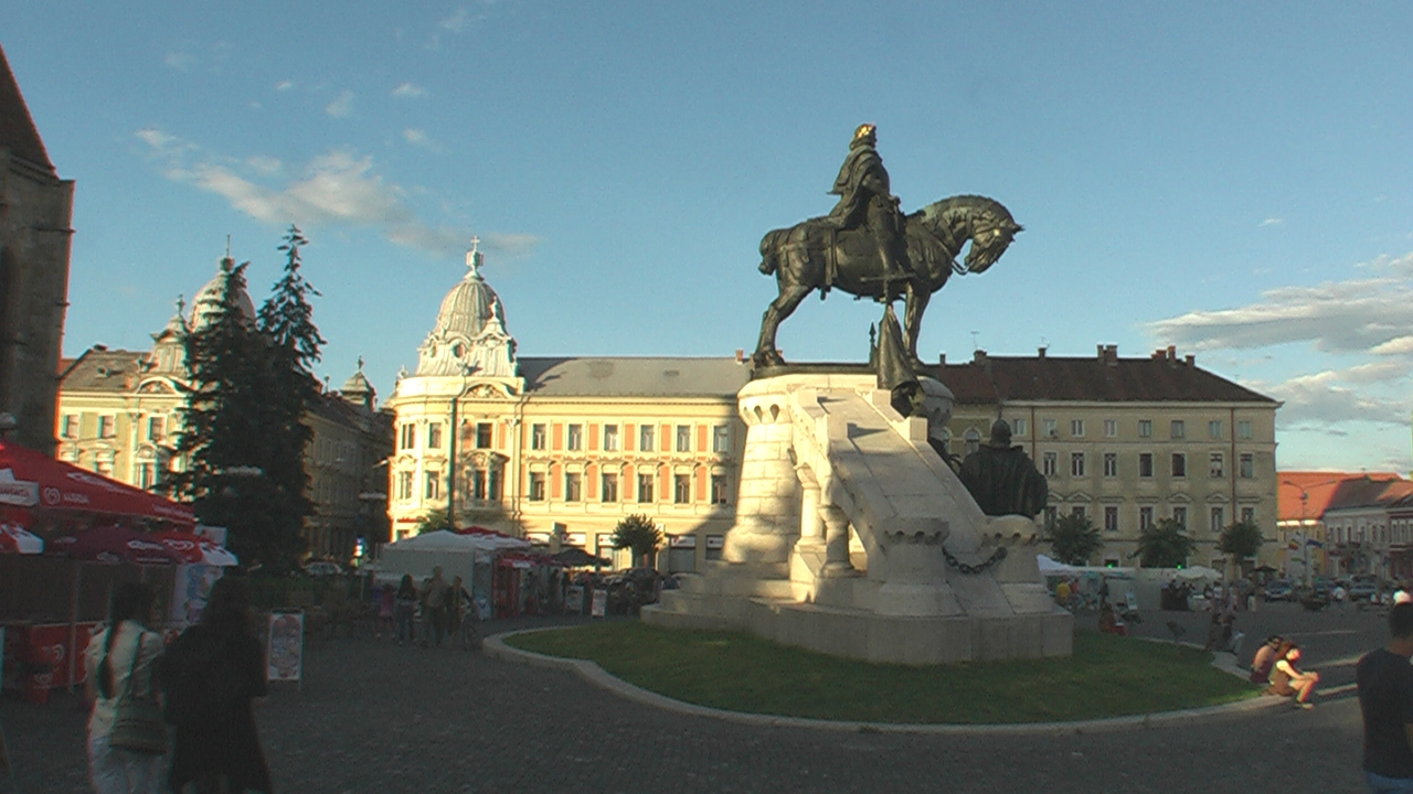 Cluj Napoca Mathias Rex Michael kirche 2